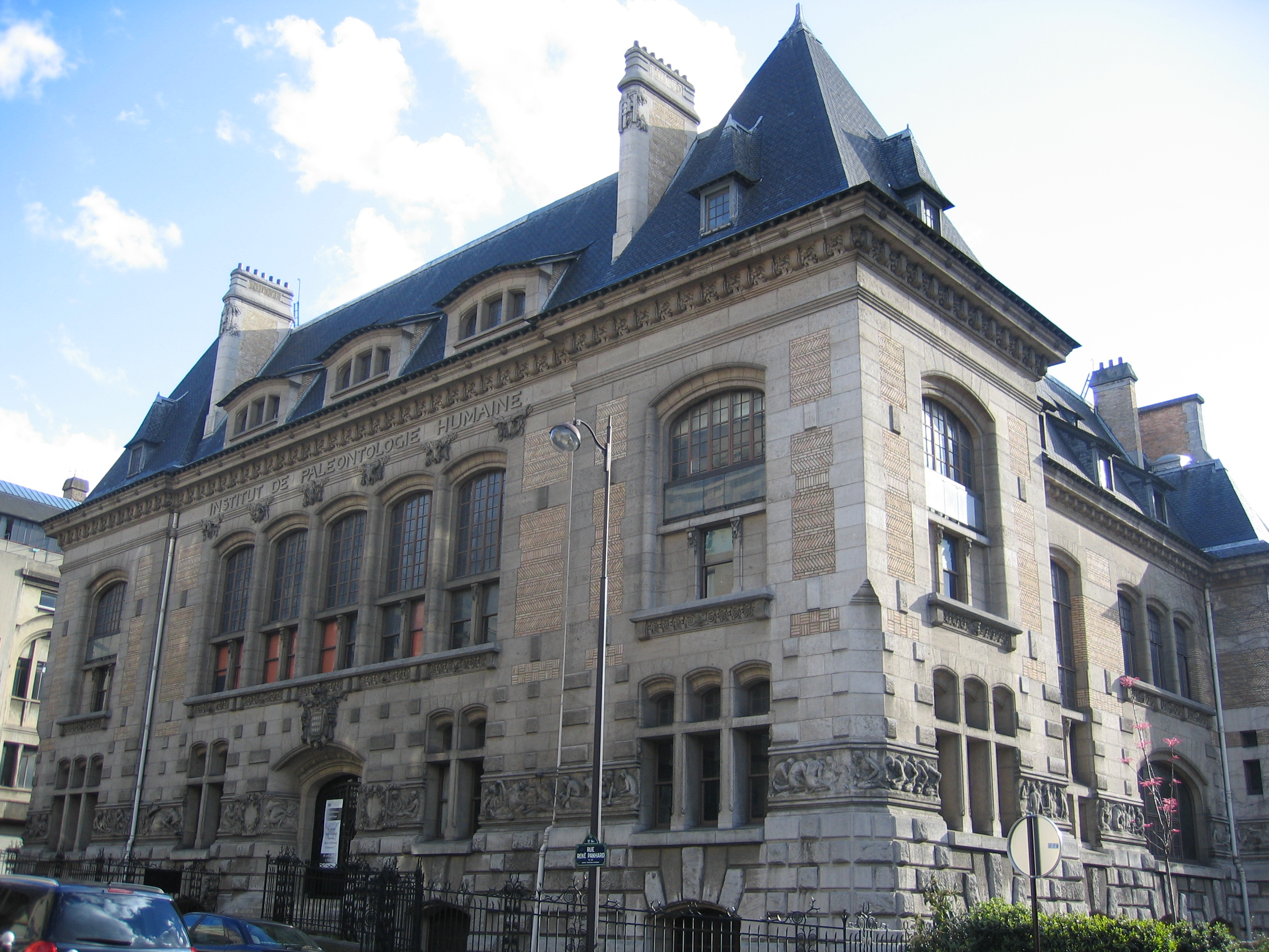 Institut de paléontologie humaine, 1 rue René-Panhard, Paris 13e.